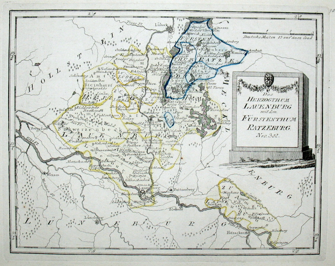 Das Herzogthum Lauenburg mit dem Fürstenthum Ratzeburg. Nro. 302. Kolorierter Kupferstich